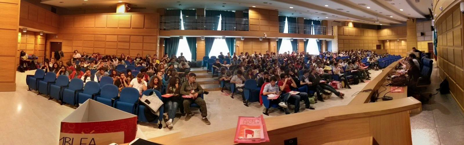 Assemblea Nazionale della Rete degli Studenti Medi, oltre 200 delegati da tutta Italia nell'aula della Regione Lazio a Roma, 2 maggio 2015.